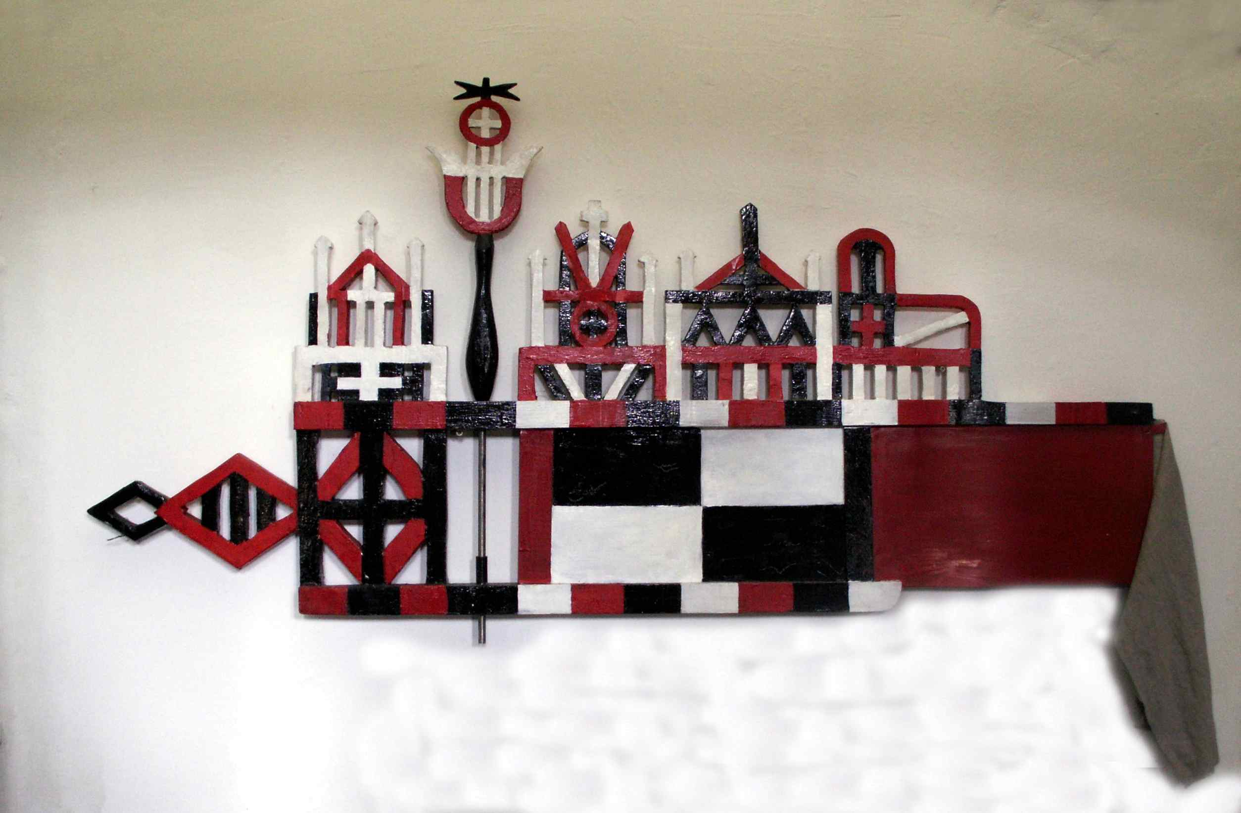 Nidos vėtrungė